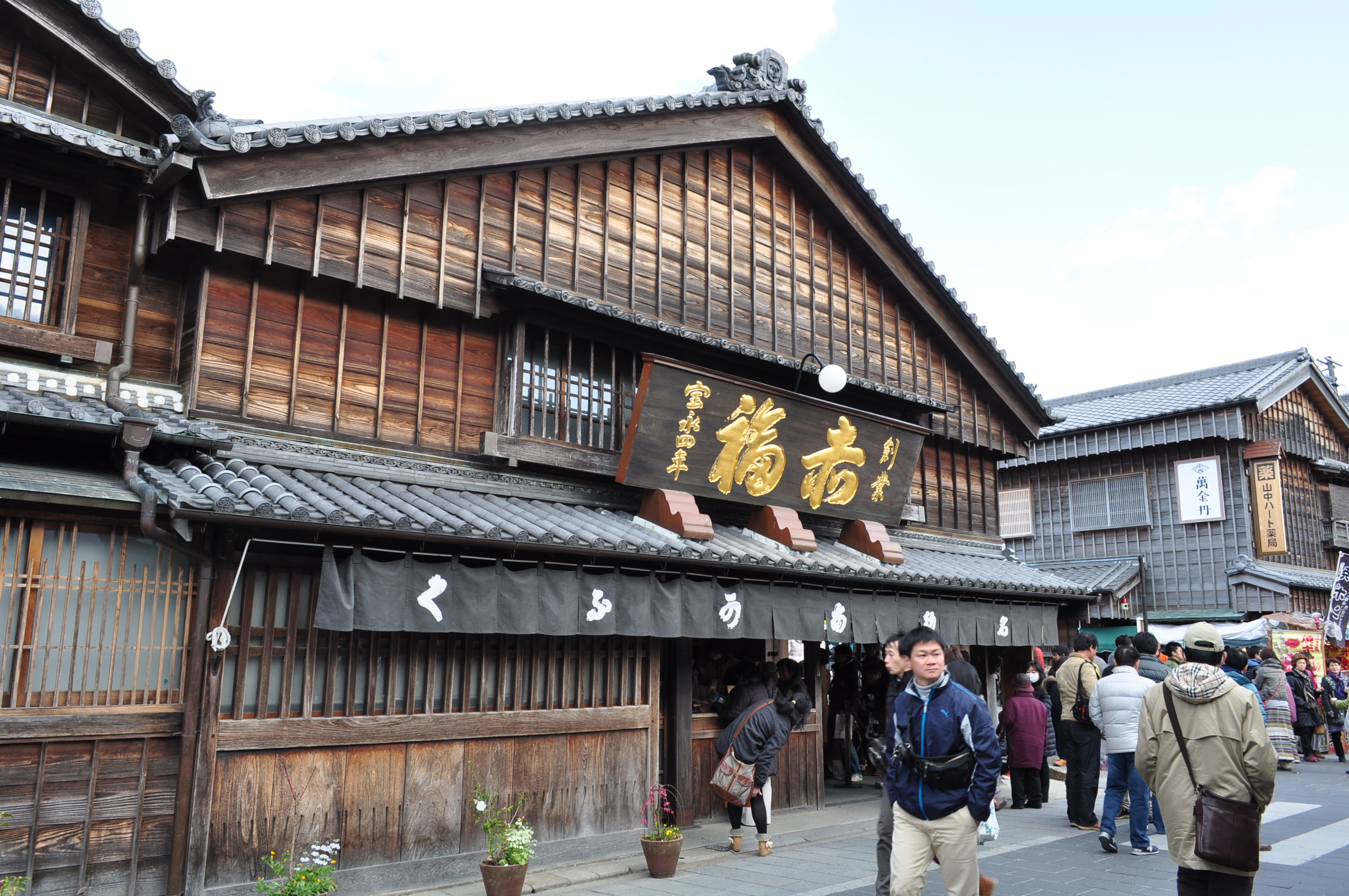 （2014年3月8日撮影）